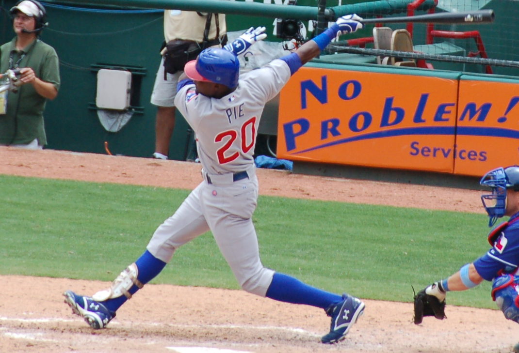 Félix Pie